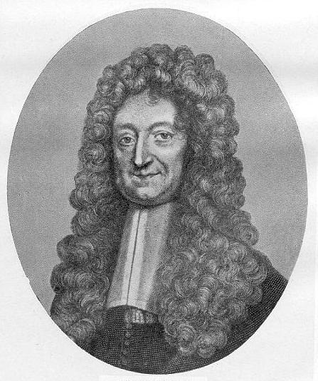 Jean François Boissonade de Fontarabie (1774–1857), französischer Altphilologe. Medaillon von David d’Angers aus dem Besitz von John Edwin Sandys, Cambridge University Press.